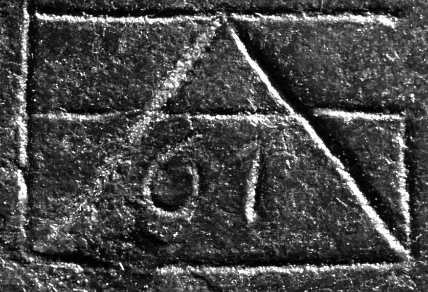 Signatur von Friedrich Adolf Sötebier aus dem Jahr 1961 auf dem Portraitrelief von Ludwig Heinrich Christoph Hölty an dem Gedenkmal von 1901 auf dem alten St.-Nikolai-Friedhof in Hannover. Die Signatur ist zusammengesetzt aus den Versalien des Namens Friedrich Adolf Sötebier (F A S) und der Jahreszahl 61 (für 1961).